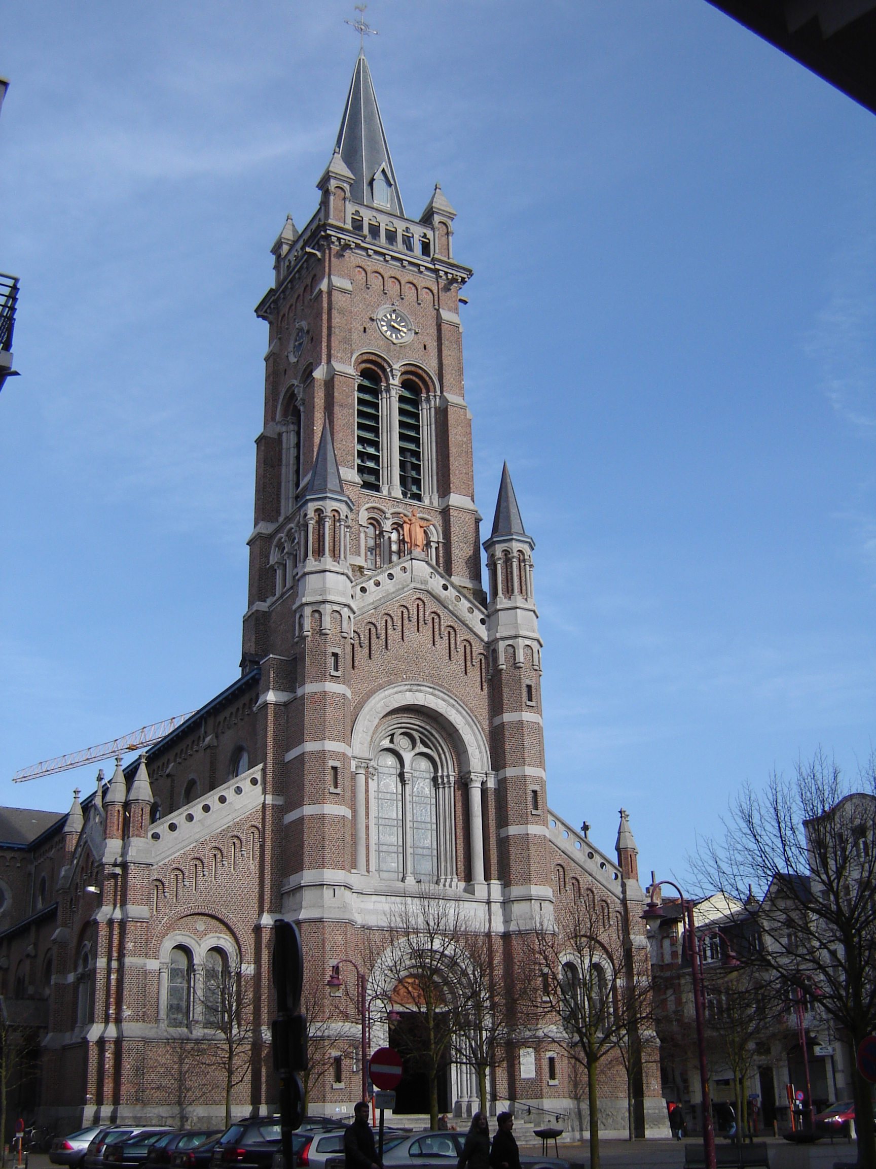 Decanale Sint-Rochuskerk in BlankenbergeDeanery church of Saint Roch in Blankenberge. Blankenberge, West Flanders, Belgium